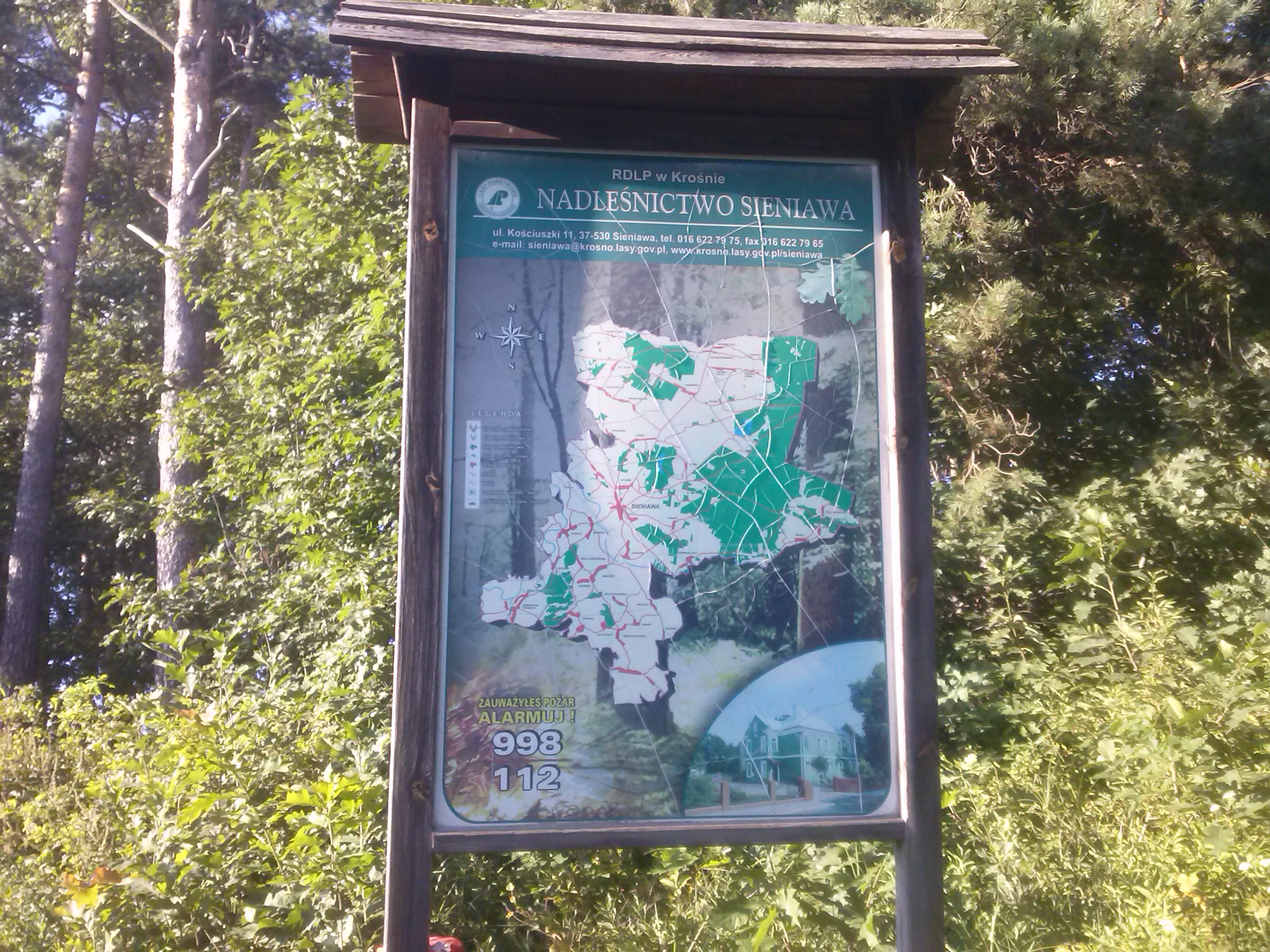 Tablica informacyjna - Mapa Nadleśnictwa Sieniawa